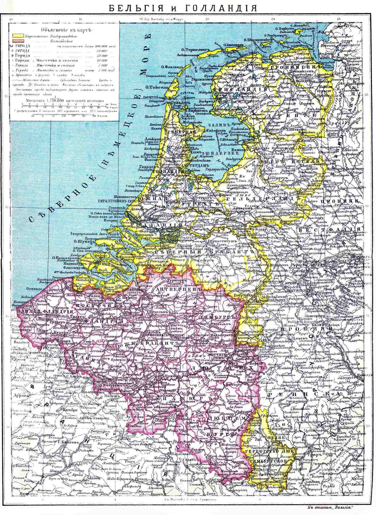 Карта Нидерландов, Бельгии и Люксембурга из энциклопедии Брокгауза и Ефрона